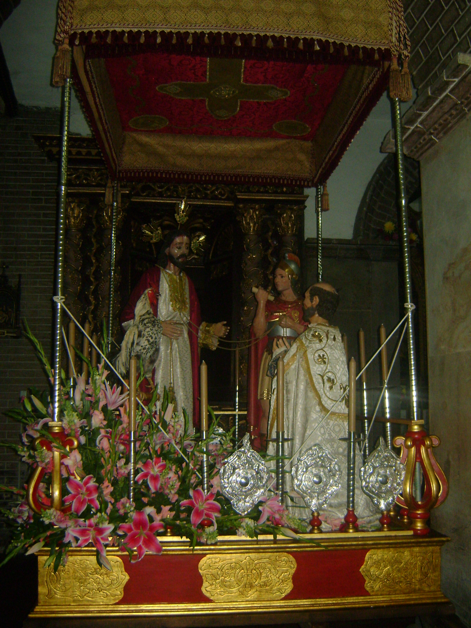 El Amo Jesús de Puelenje es una escultura de Jesucristo de talla completa y de vestir de estilo barroco, encarnada, hecha en madera policromada del siglo XVIII de la escuela quiteña venerada desde el siglo XVIII en el templo de Puelenje, corregimiento en el municipio de Popayán, Colombia.